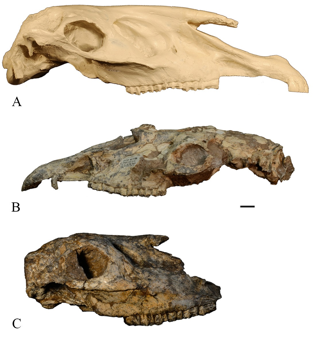 Cremohipparion proboscideum SENK4709 specimen skull lateral view; B) Cremohipparion licenti AMNH125708 specimen, skull lateral view; C) Cremohipparion licenti THP20764 type specimen, skull lateral view. Scale bar = 2 cm.